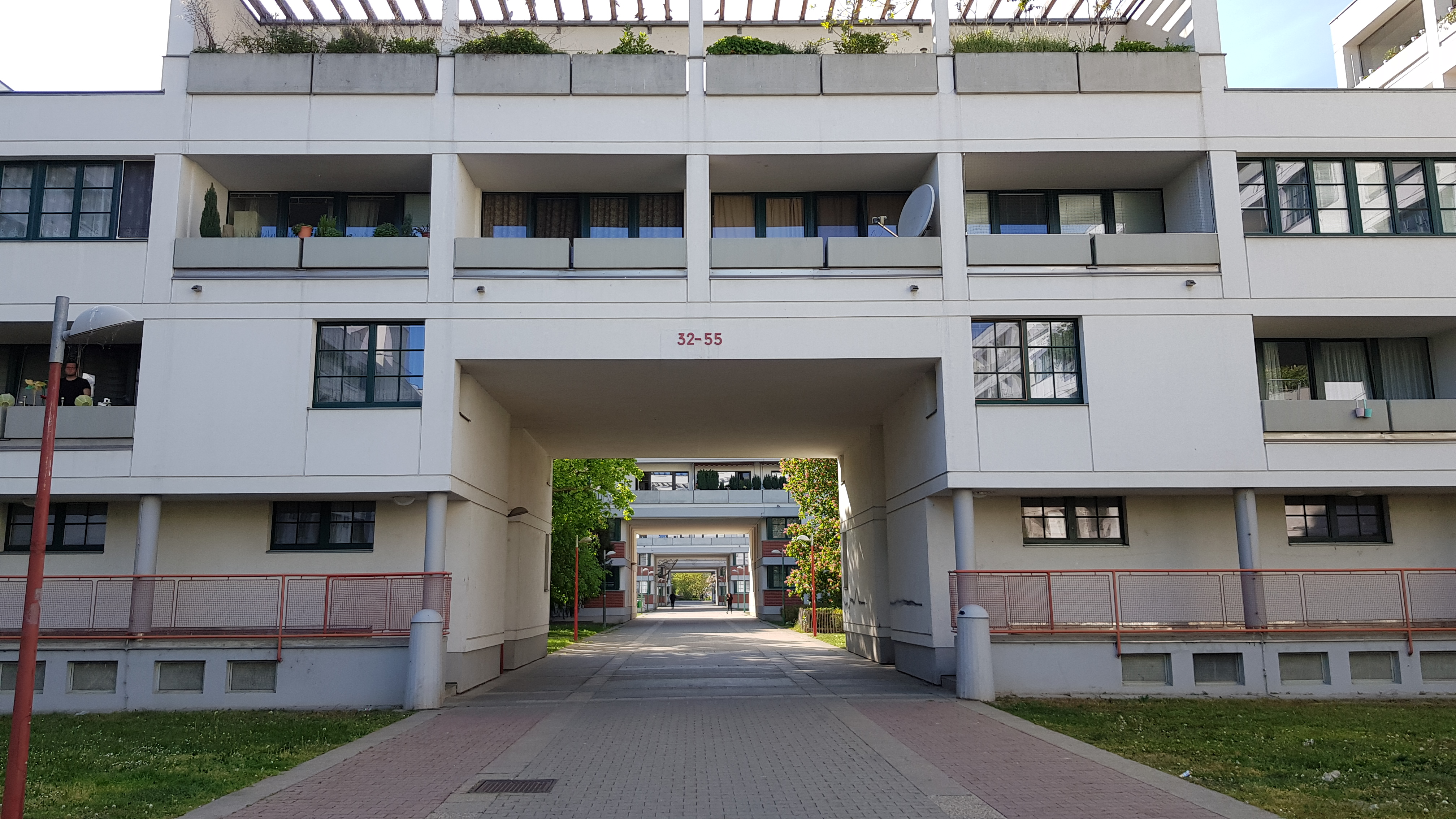 Durchgang zwischen den Höfen, am Schöpwerk